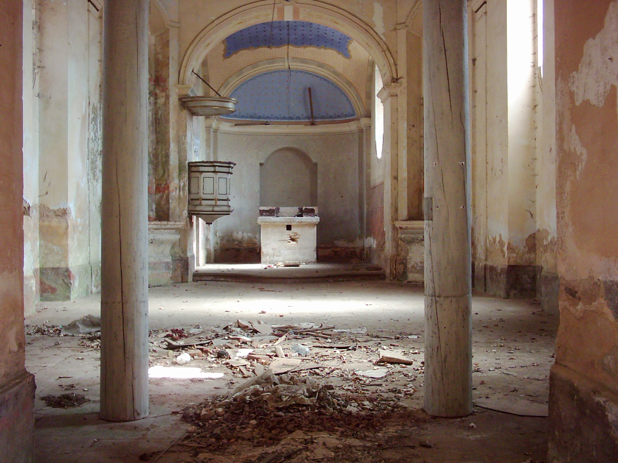 Toužim, Komárov, kostel sv. Vavřince. Interiér kostela.